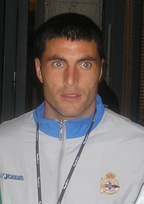 Diego Tristán durante su etapa en el Depor